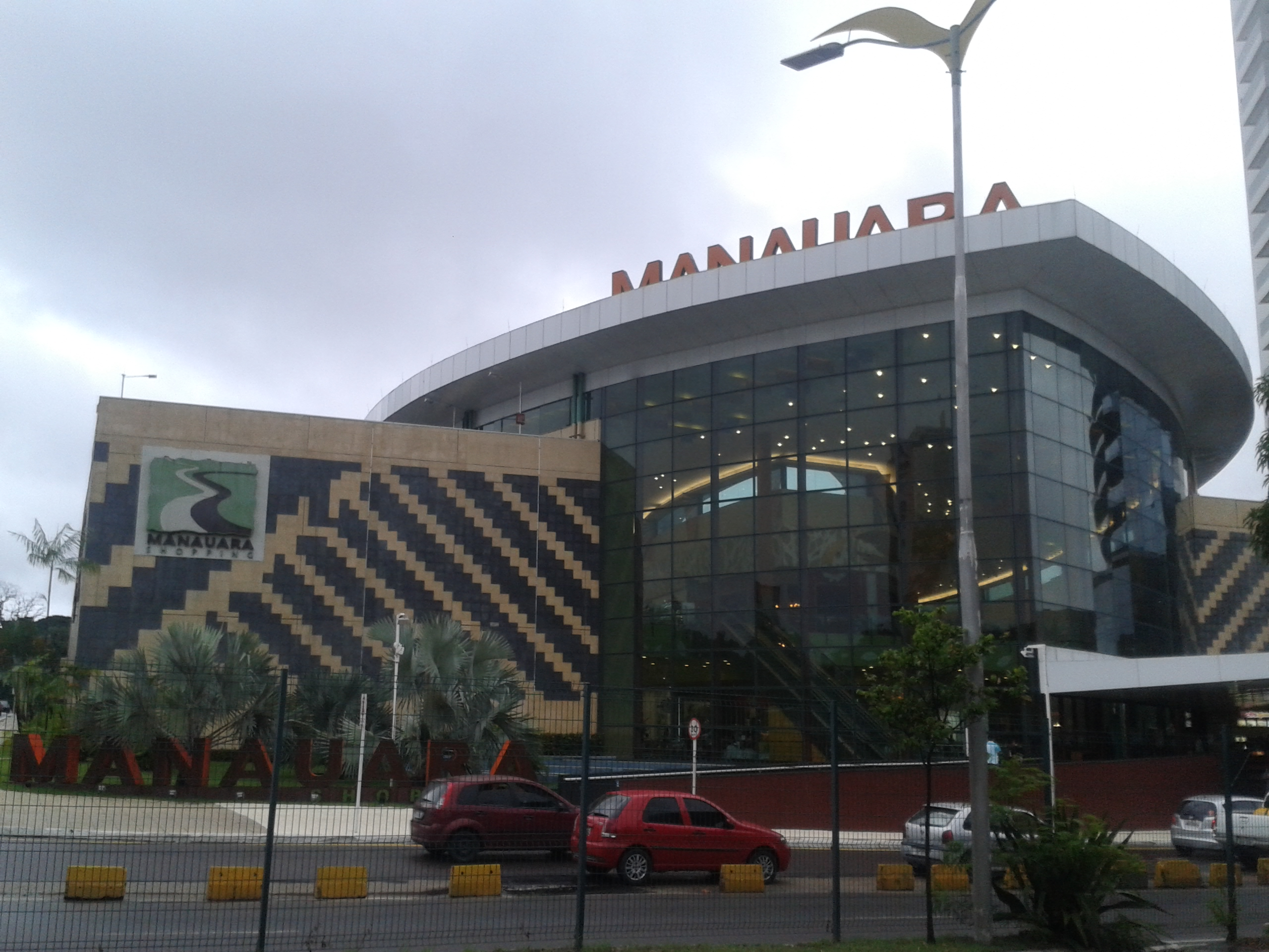 Fachada do Manauara Shopping, Manaus, Brasil.